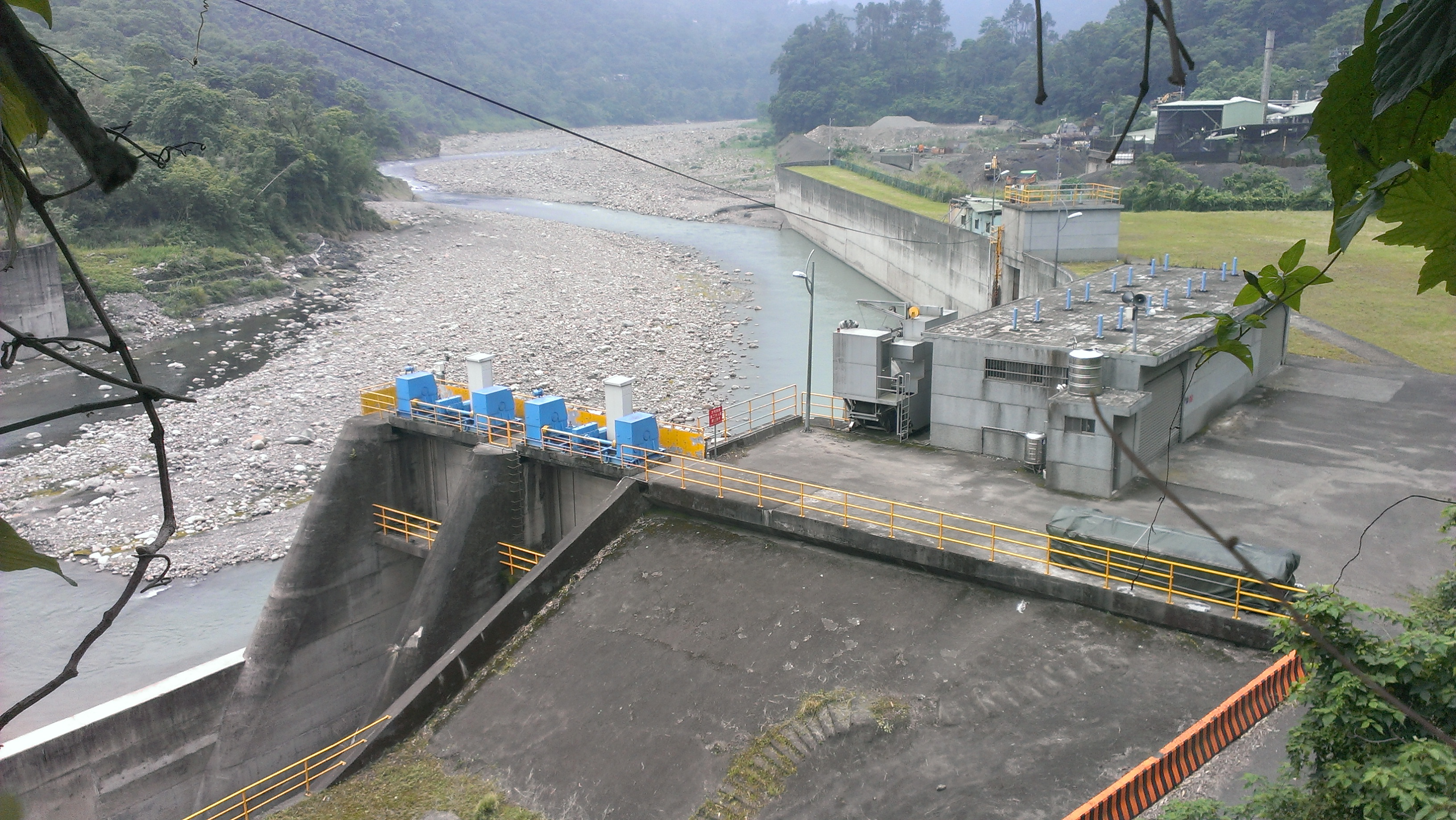 上坪溪之竹東圳源頭二